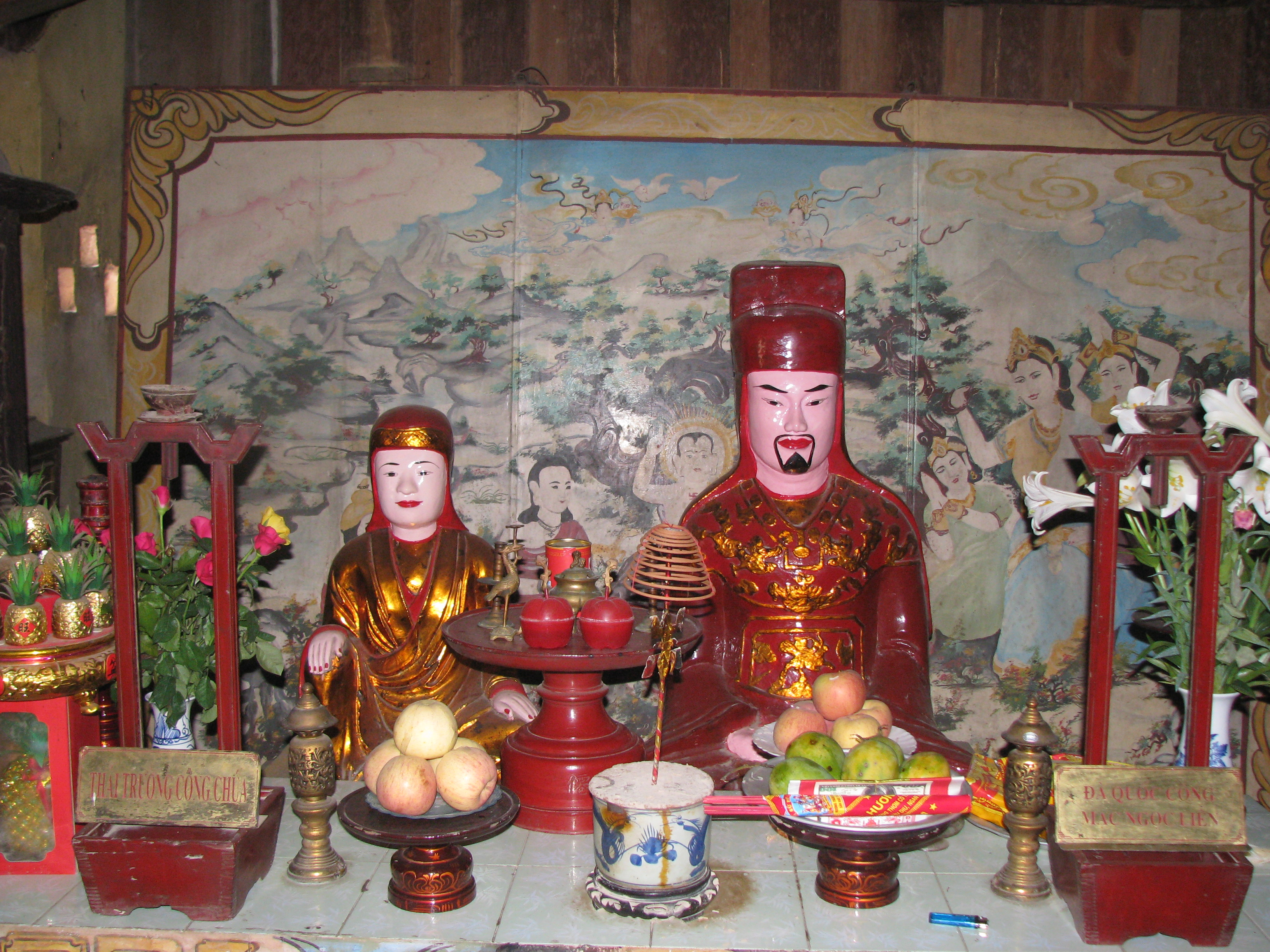 Portrait statues of General Mac Ngoc Lien and his wife (Princess Mac Thi Ngoc Lam) at Linh Tien Pagoda, Hoai Duc District, Hanoi.